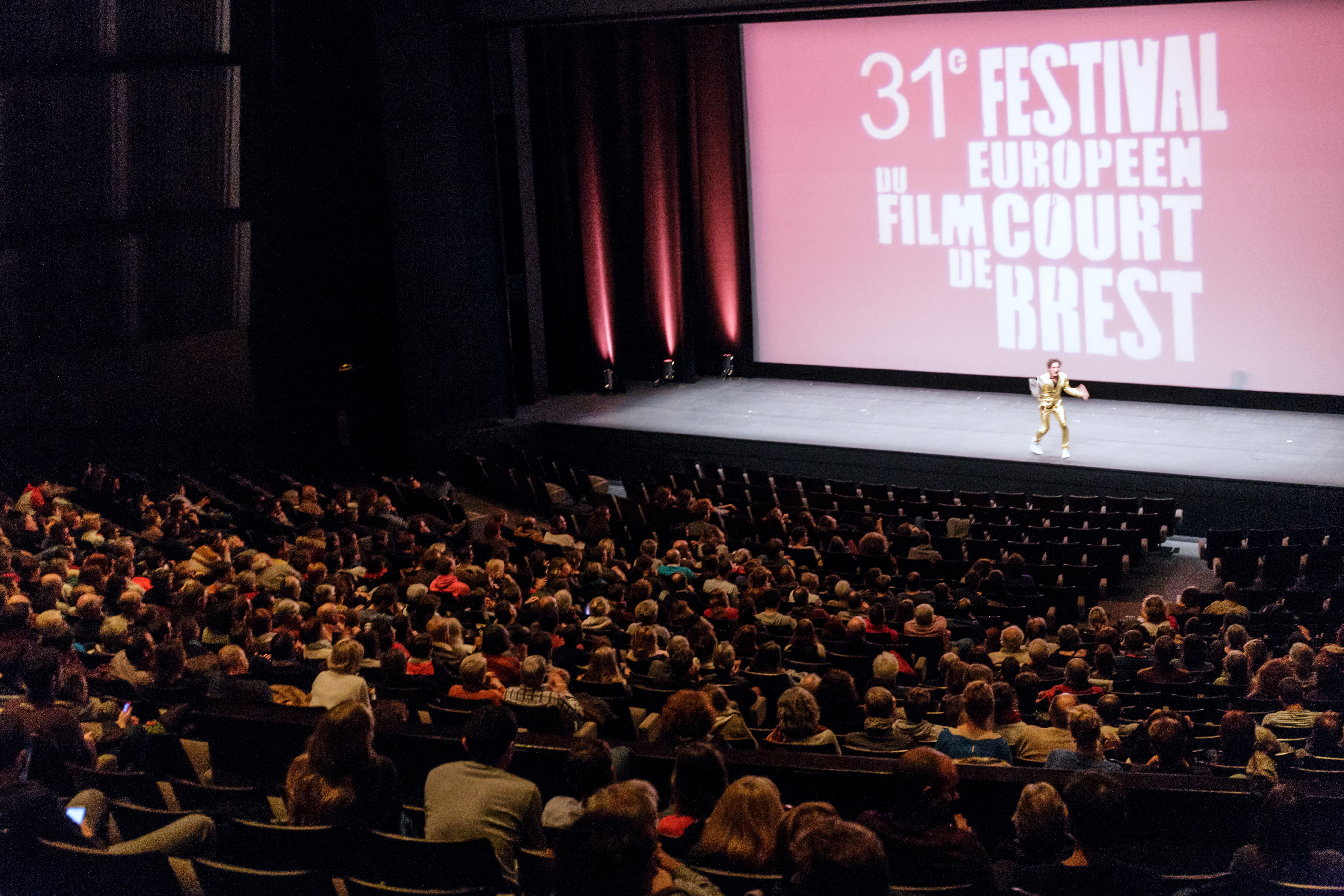 Soirée d'ouverture du Festival européen du film court de Brest dans le Grand théâtre du Quartz le mardi 8 novembre 2016.